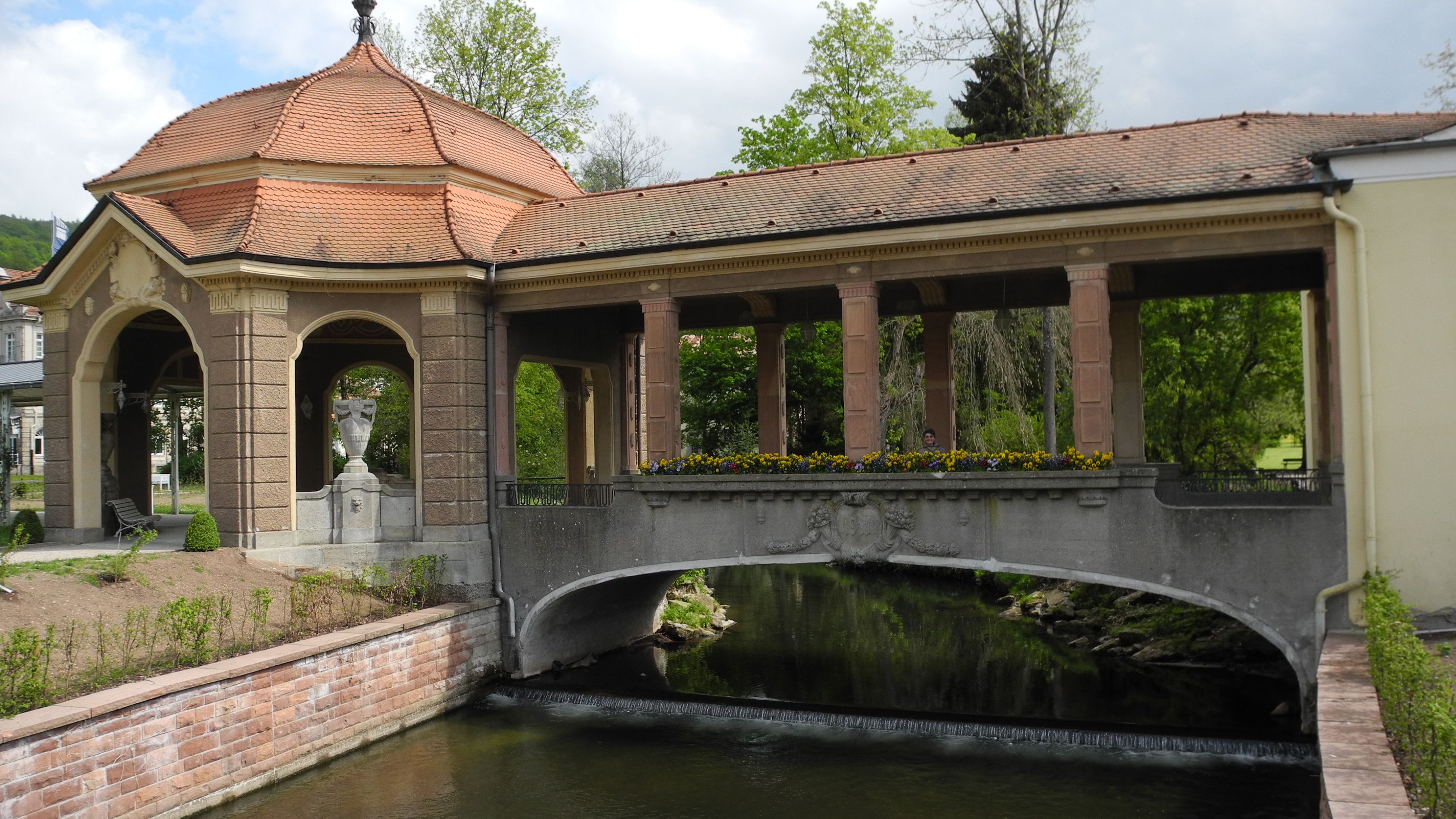 Bad Brückenau - Überdachter Wandelgang im Kurpark